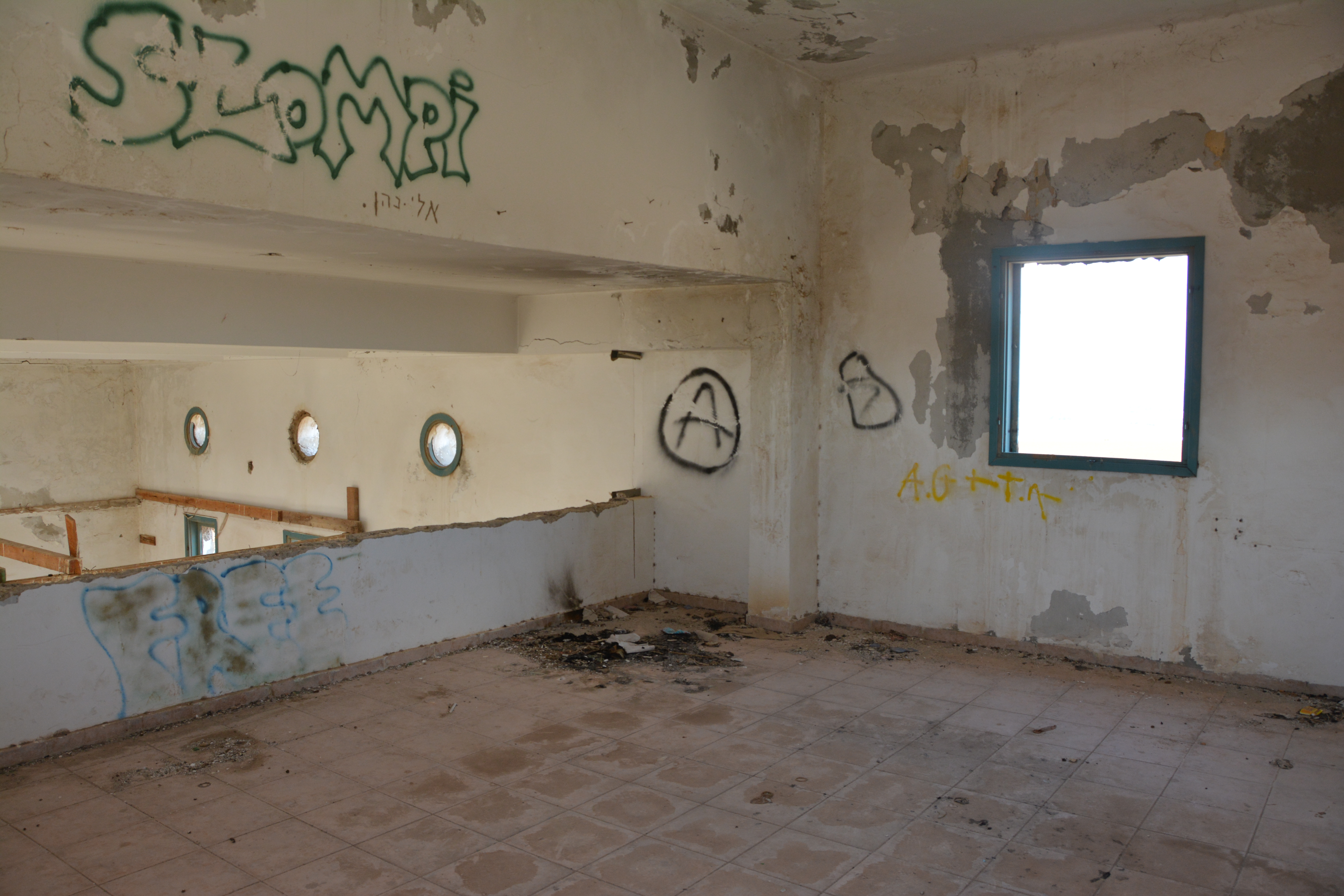 מחנה ישראל (דברת) היה קומונה של פועלי אגודת ישראל שהתארגנה לקראת חיי קיבוץ. אנשי הקבוצה התיישבו על אדמה שנרכשה בשנת 1925 בעמק יזרעאל, ליד קיבוץ דברת של היום.